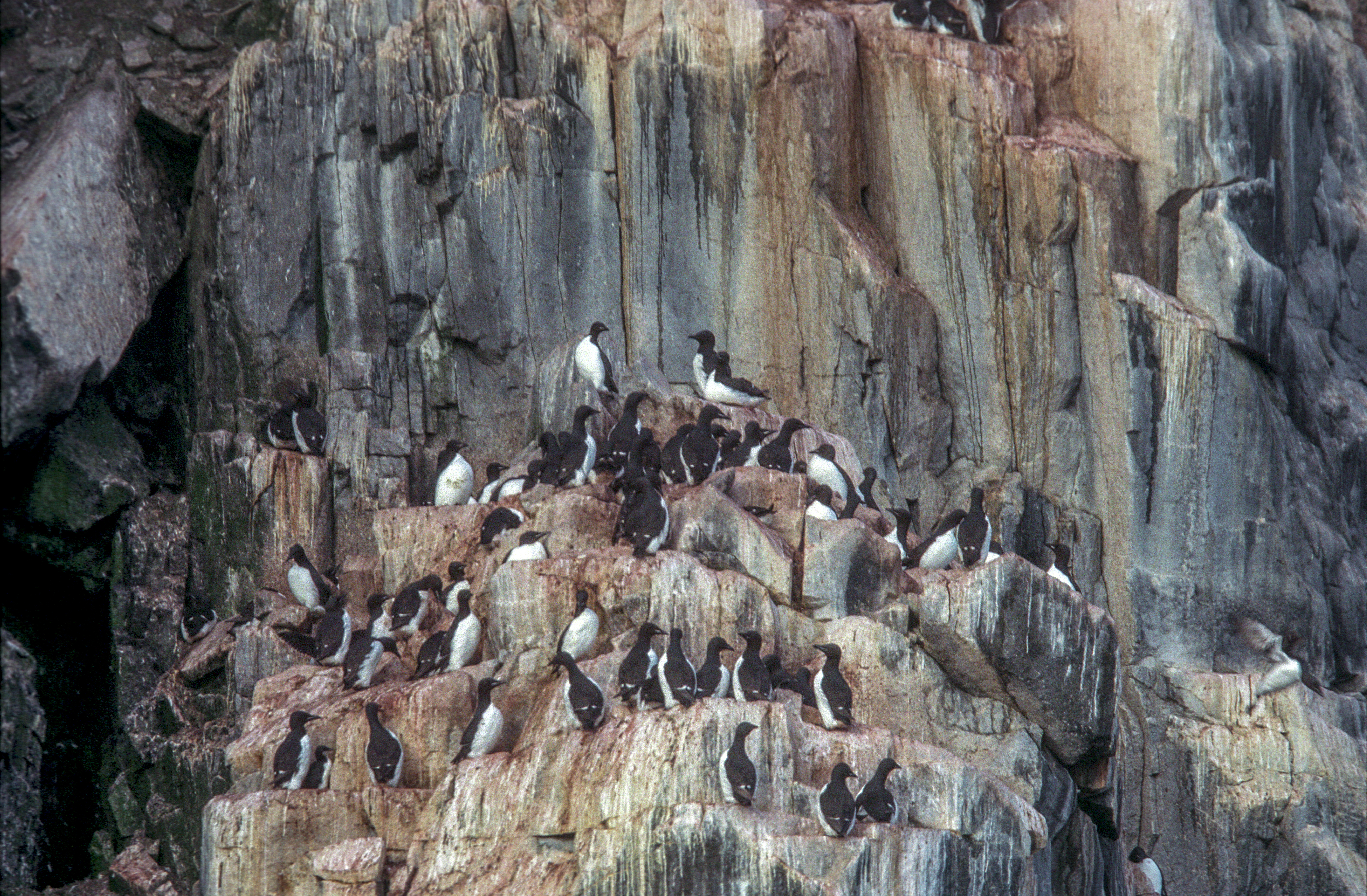 Spitsbergen, Alkefjellet